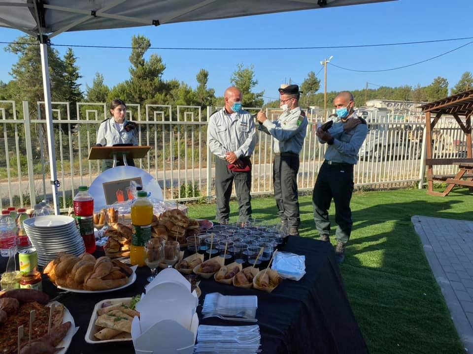 טקס החלפת מפקד חטיבה 11. מפקד החטיבה הנכנס אל"מ יונתן מופז והמפקד היוצא אל"מ אביחי זפרני שמונה למח"ט יהודה.